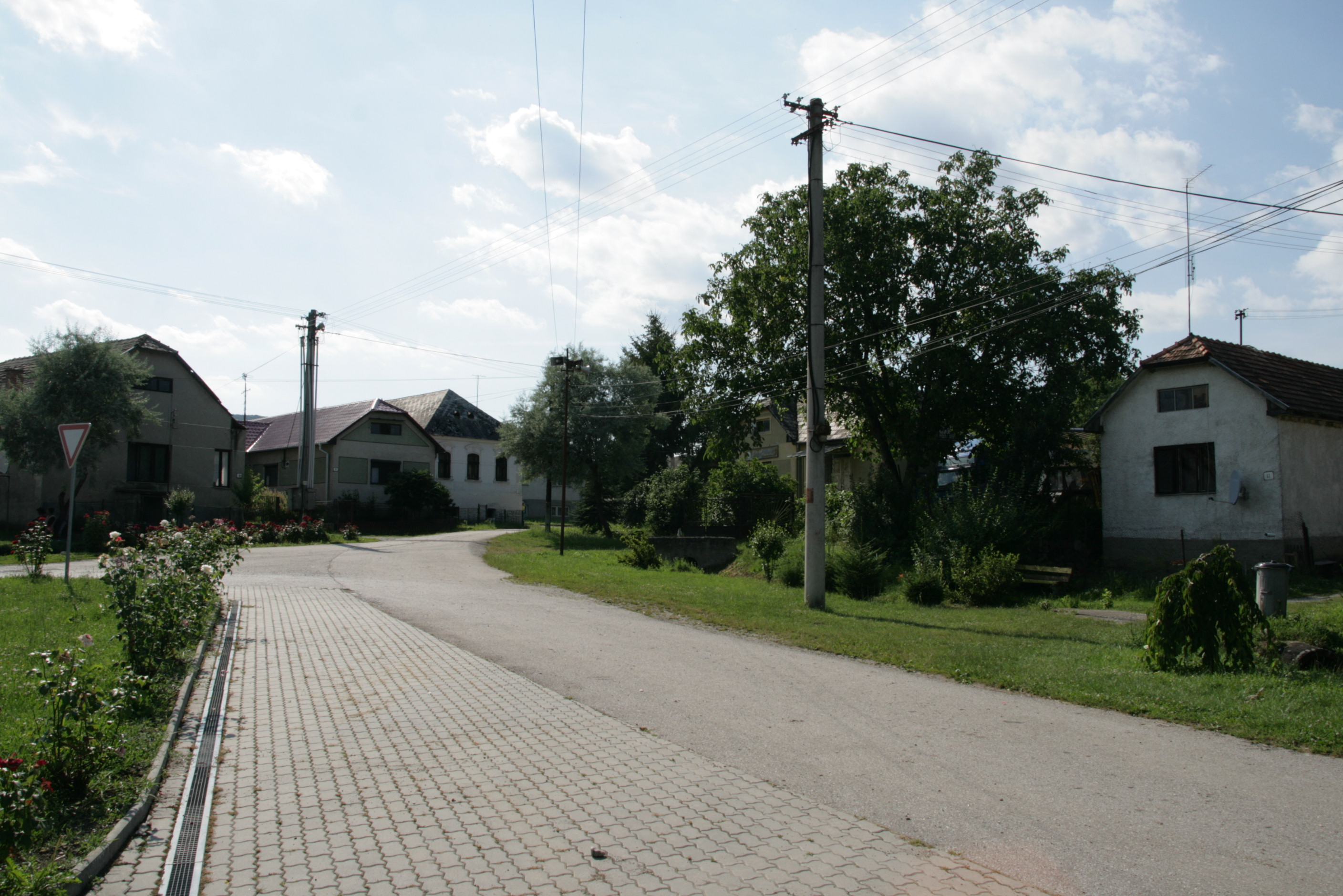 Balogpádár - utcakép